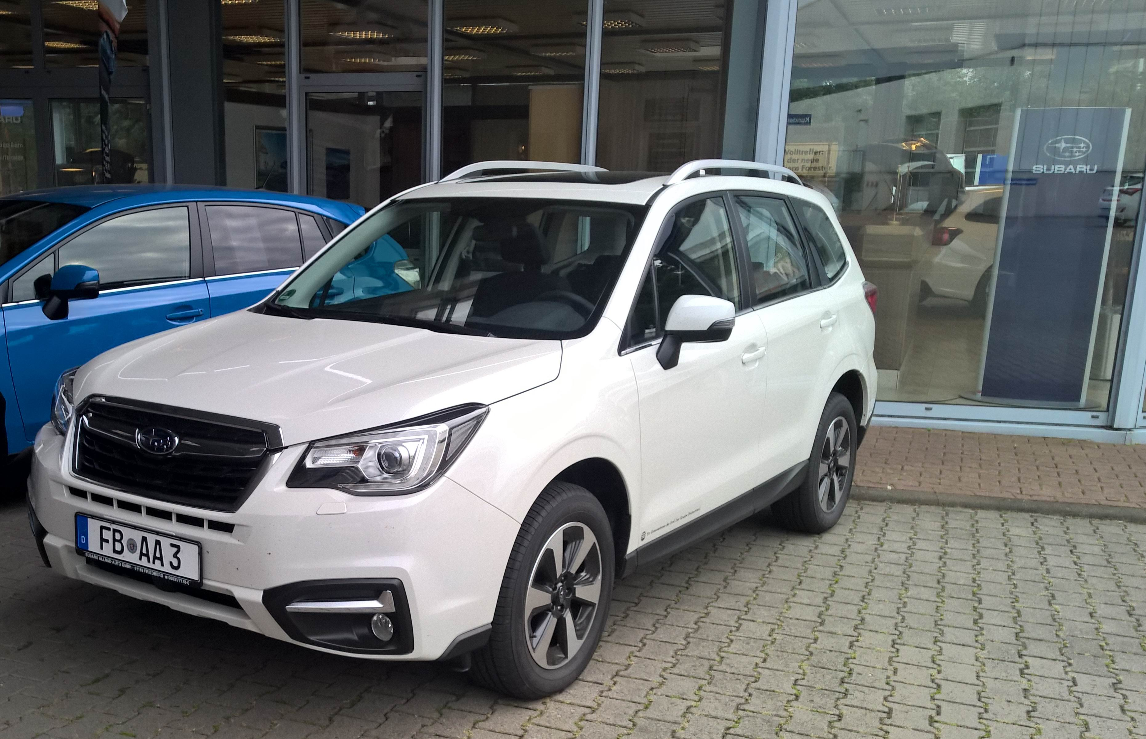 Subaru Forester 2.0X Exclusive Lineartronic. Facelift 2016 mit den neuen LED Scheinwerfern.